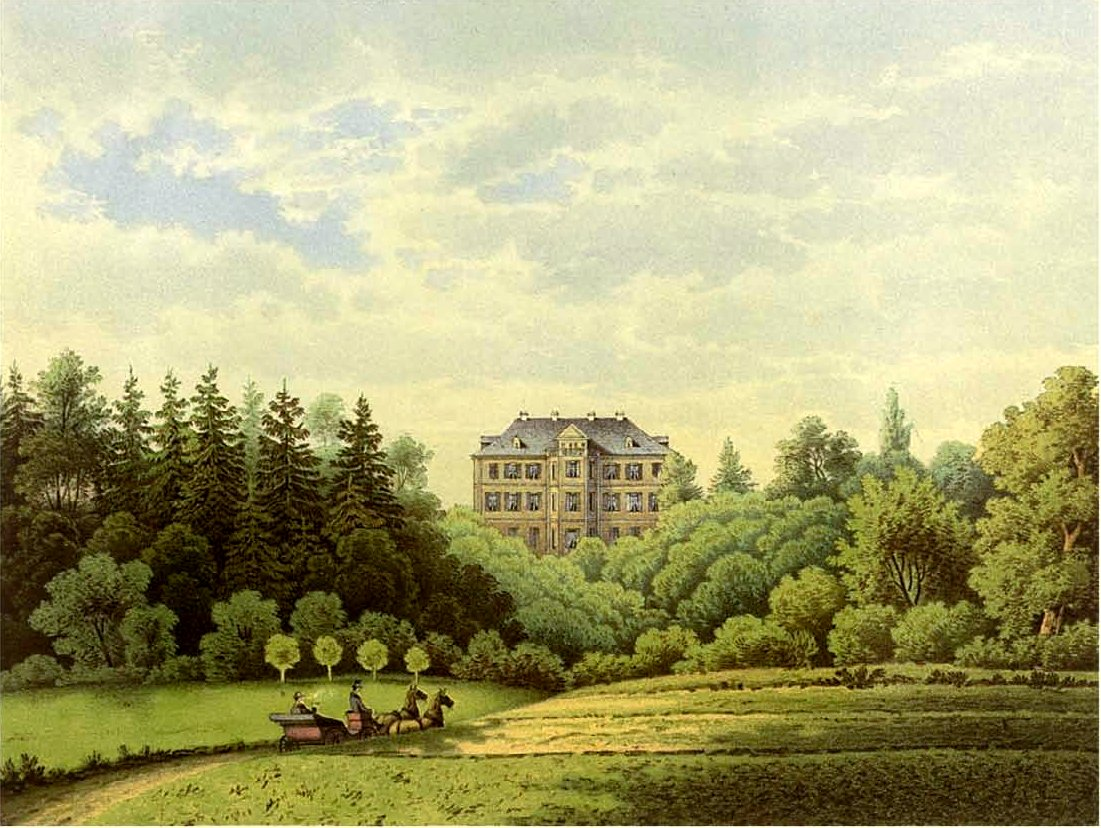 Burg Rösberg, Kreis Bonn , Bornheim (Rheinland)